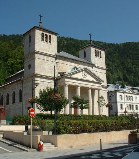 Eglise de Morez